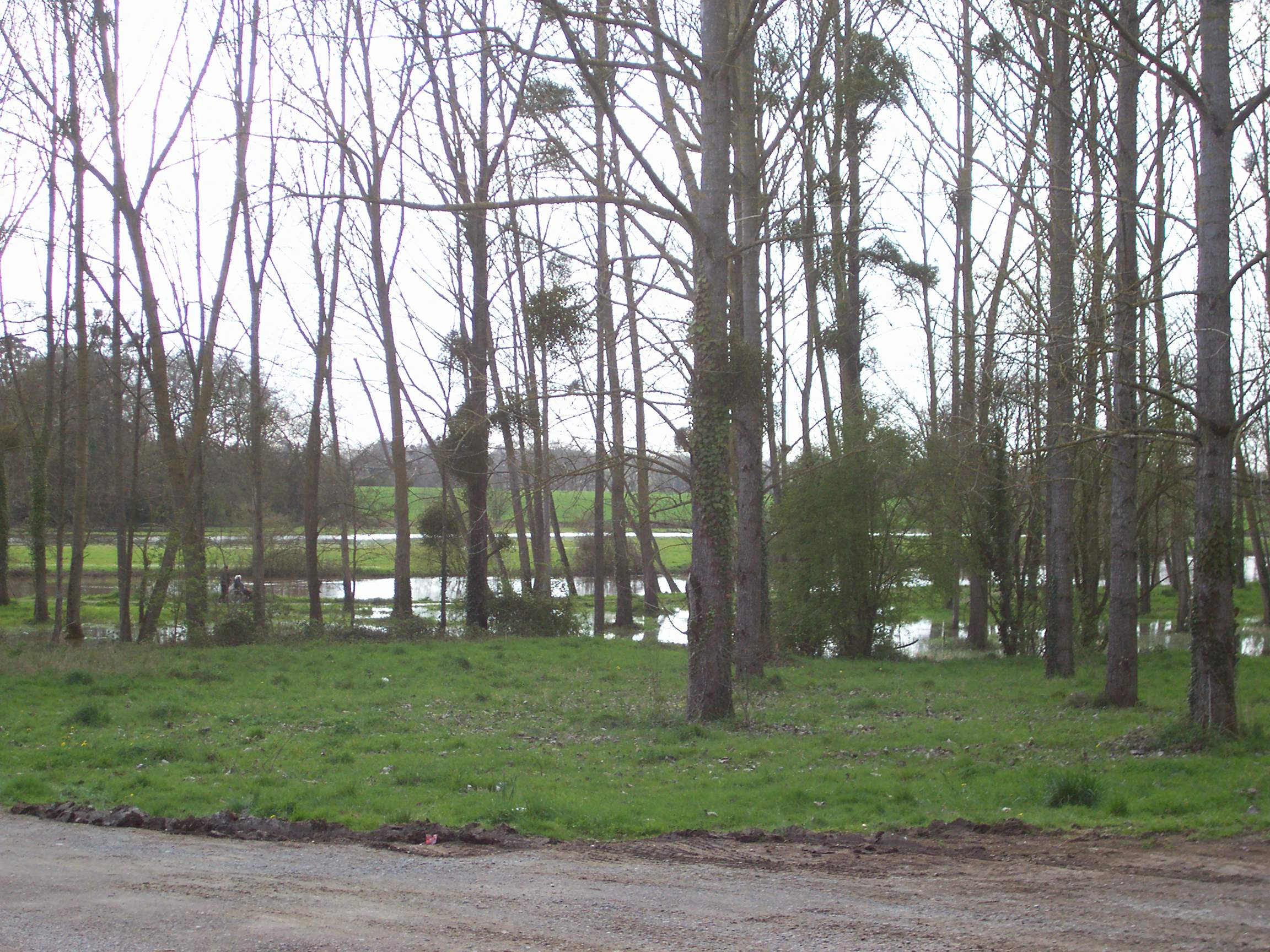 Zone humide avec peupleraie sur la commune de Mordelles, Ille et Vilaine, France.